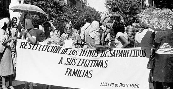 No a la amnist’a. Juicio y castigo a los culpables. Libertad a los presos pol’ticos. Restituci—ón de los niñ–os a sus leg’timas familias